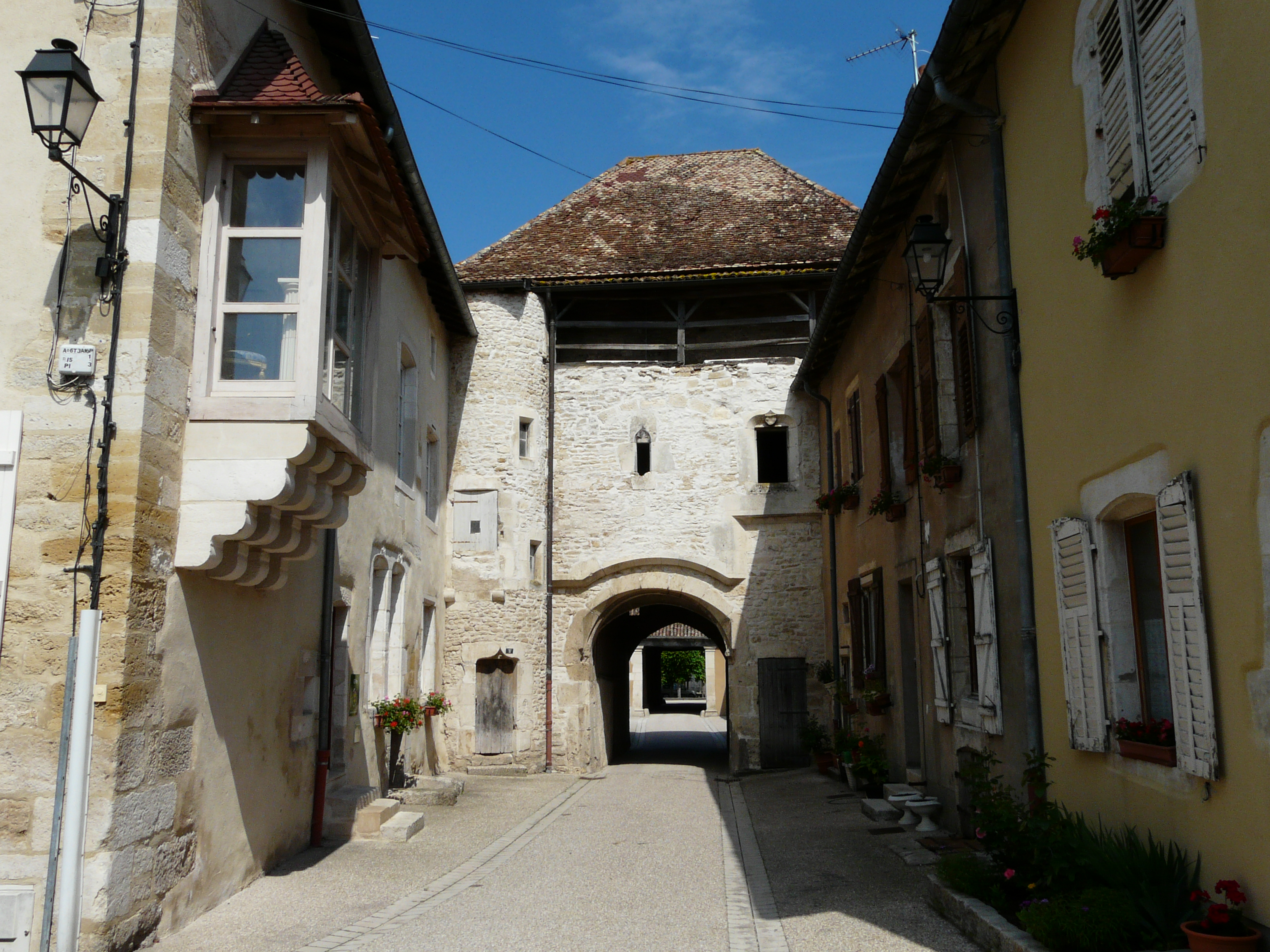 Tour de la Poterne, vestige du château disparu de Void, vue de l'intérieur du château (Meuse, France)